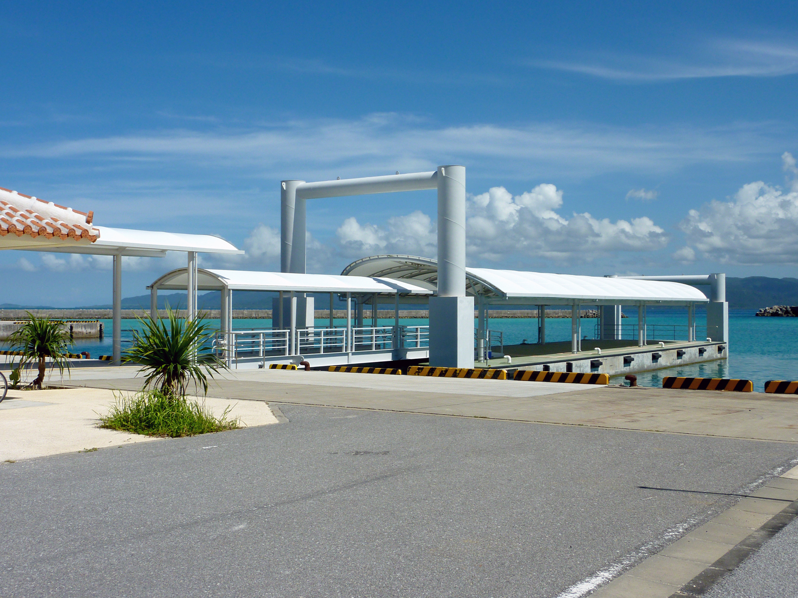 鳩間港浮桟橋（沖縄県八重山郡竹富町鳩間島）